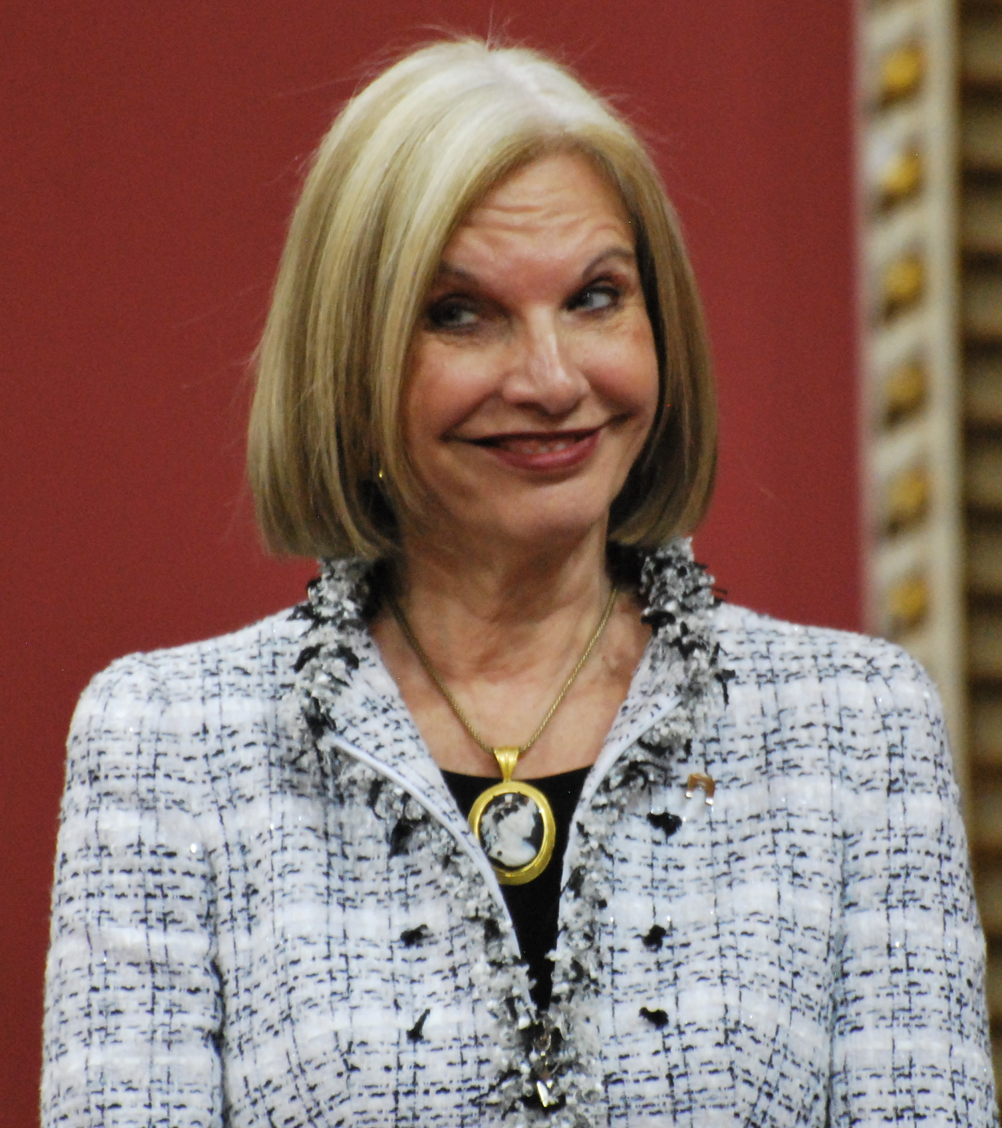 Cérémonie de remise de l'ordre national du Québec 2013. Monique Jérôme-Forget